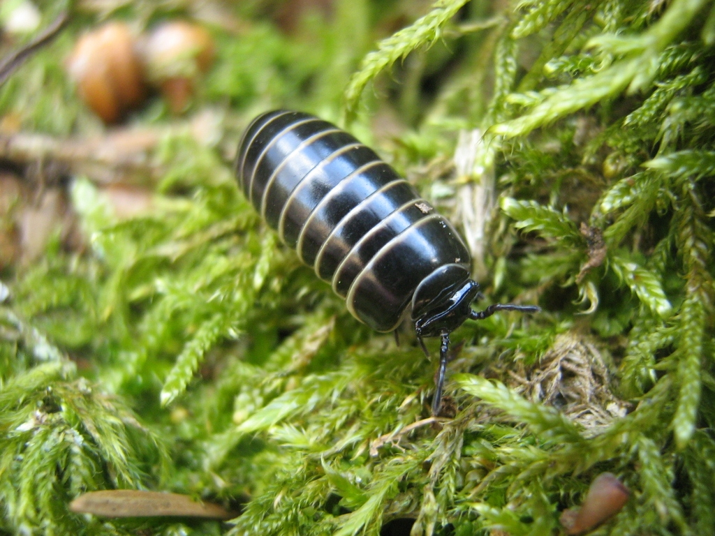 Der Saftkugler Glomeris marginata, gefunden im Billenhägener Forst (Landkreis Bad Doberan) in einem lichten Rotbuchenbestand in der Bodenstreu an einem Buchenstubben. 54°7′14″N 12°22′7″E / 54.12056°N 12.36861°E